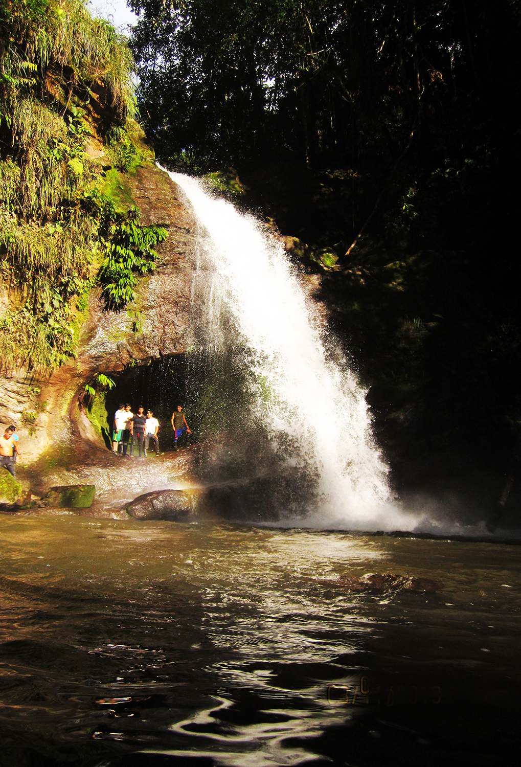 CASCADA GARGANTA DE LORO